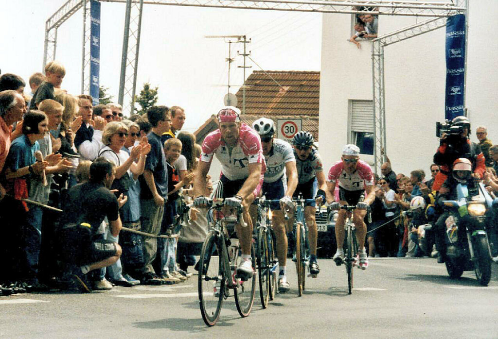 Rund um den Henninger-Turm 1. Mai 2000: Spitzengruppe mit Kai Hundertmarck, Matteo Tossato, Jörn Reuß und Jens Heppner am Mammolshainer Berg.